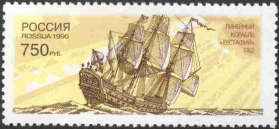 Почтовая марка России